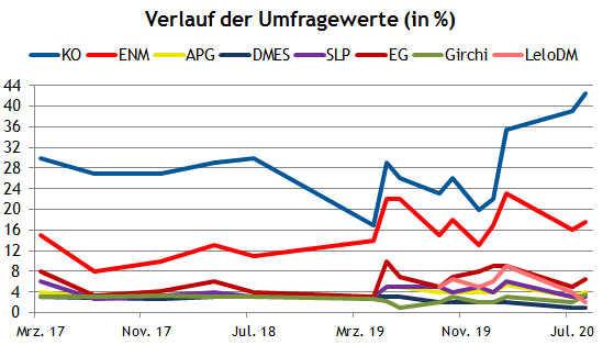 Umfragen zur Parlamentswahl in Georgien 2020